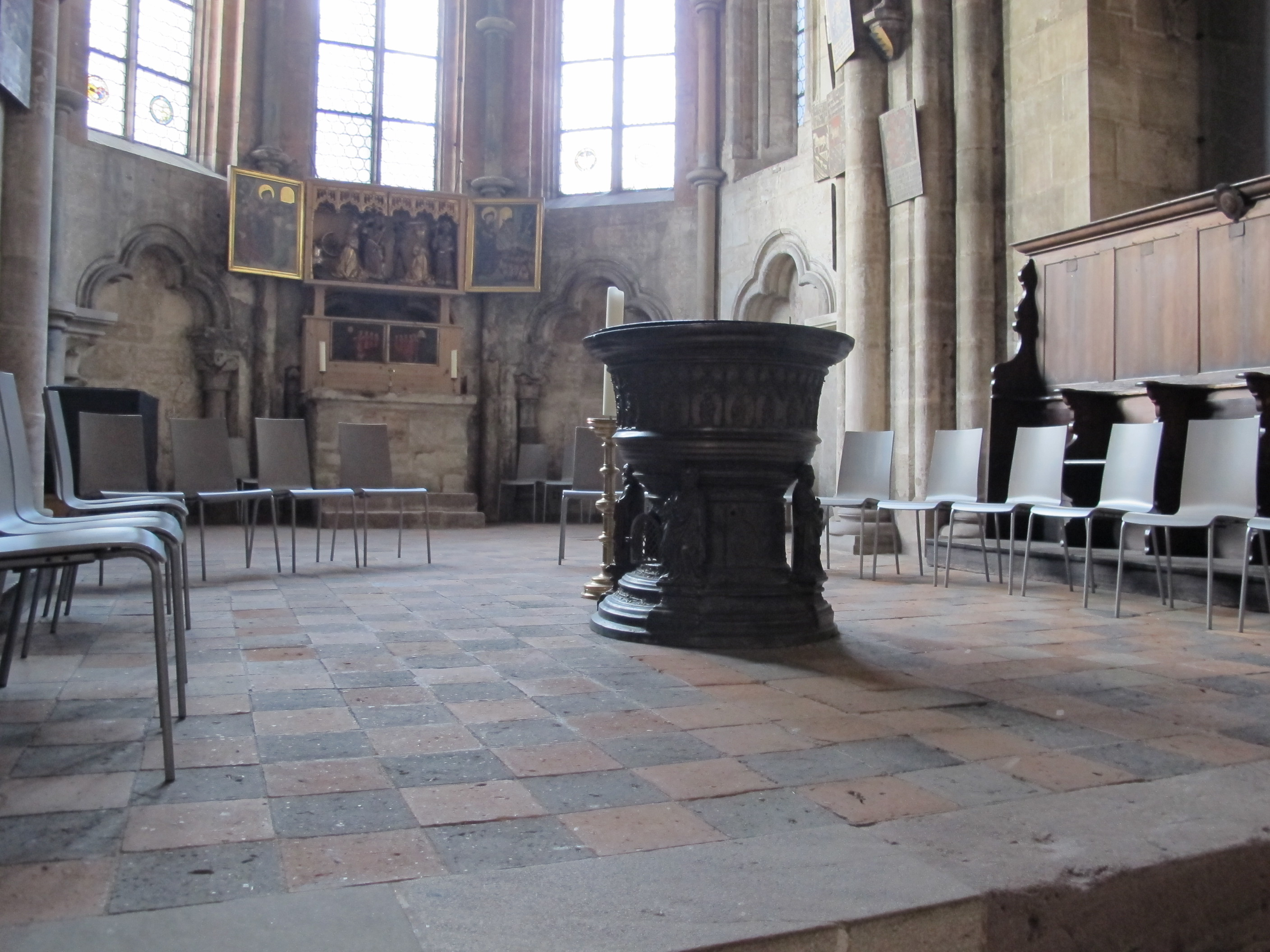 St. Sebald, Nuremberg, interrio